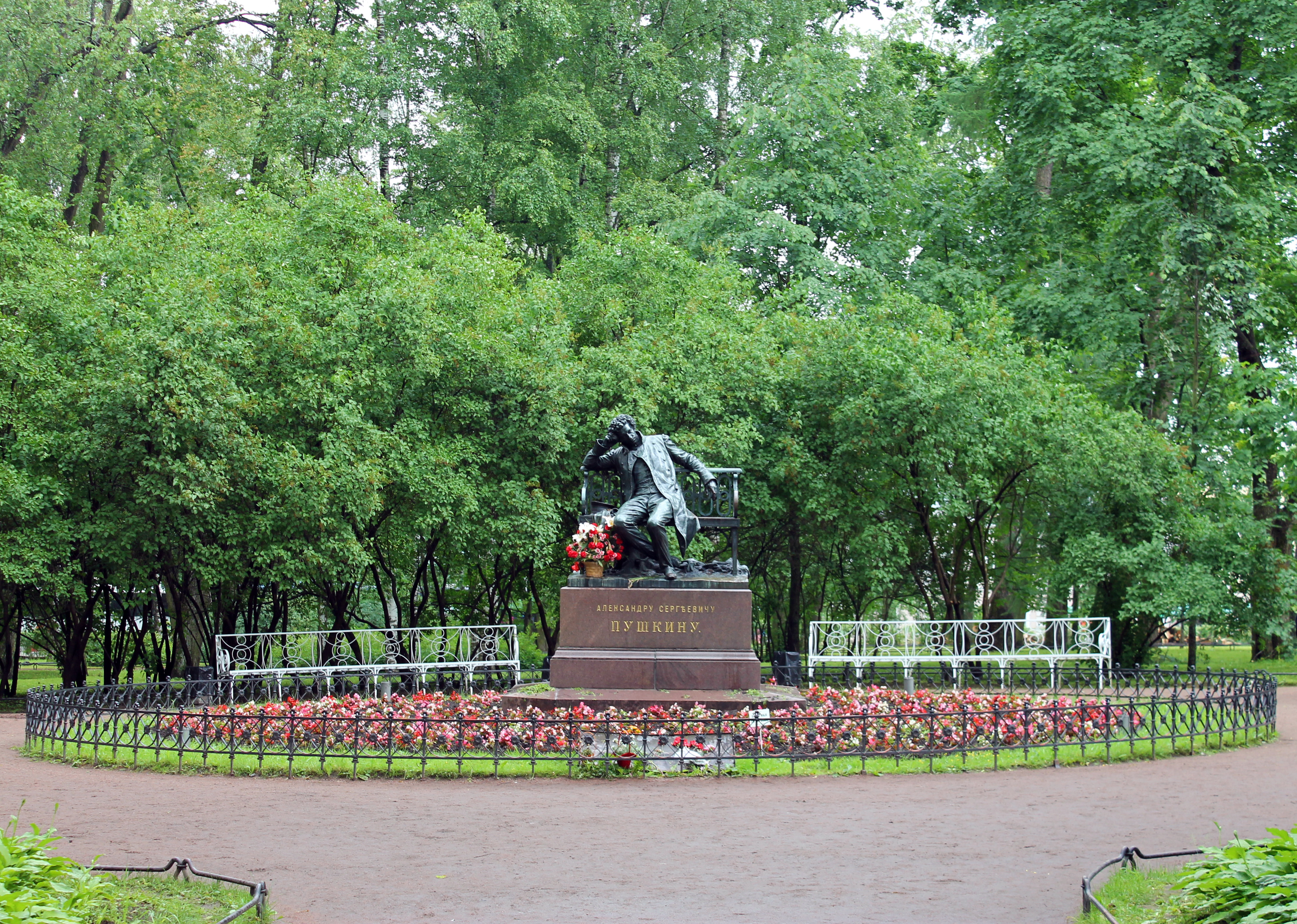 Сад Лицейский (Санкт-Петербург и Лен.область, Пушкин, между Лицейским переулок, Садовой улица, Малой улица)